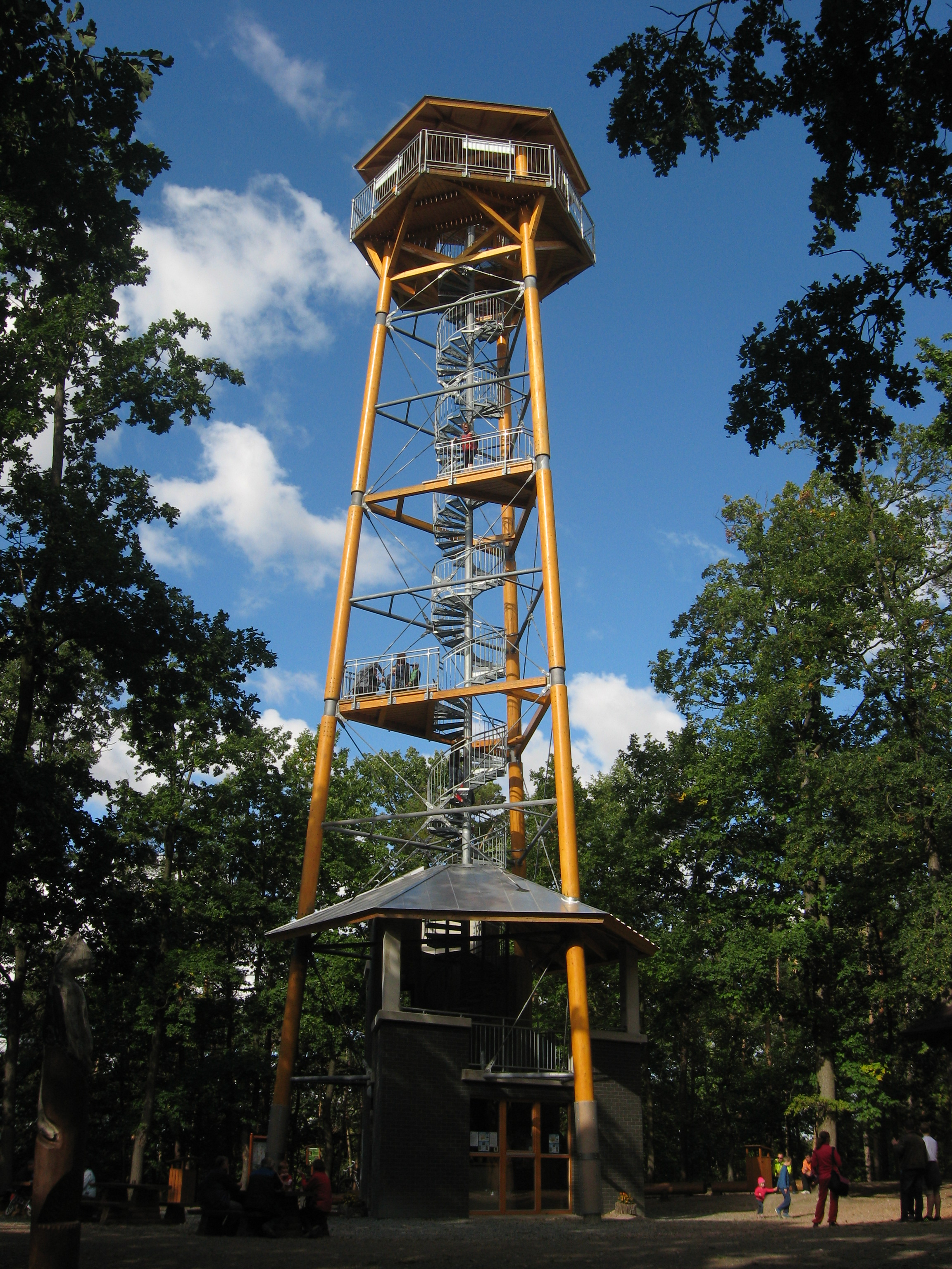 Rozhledna Milíř